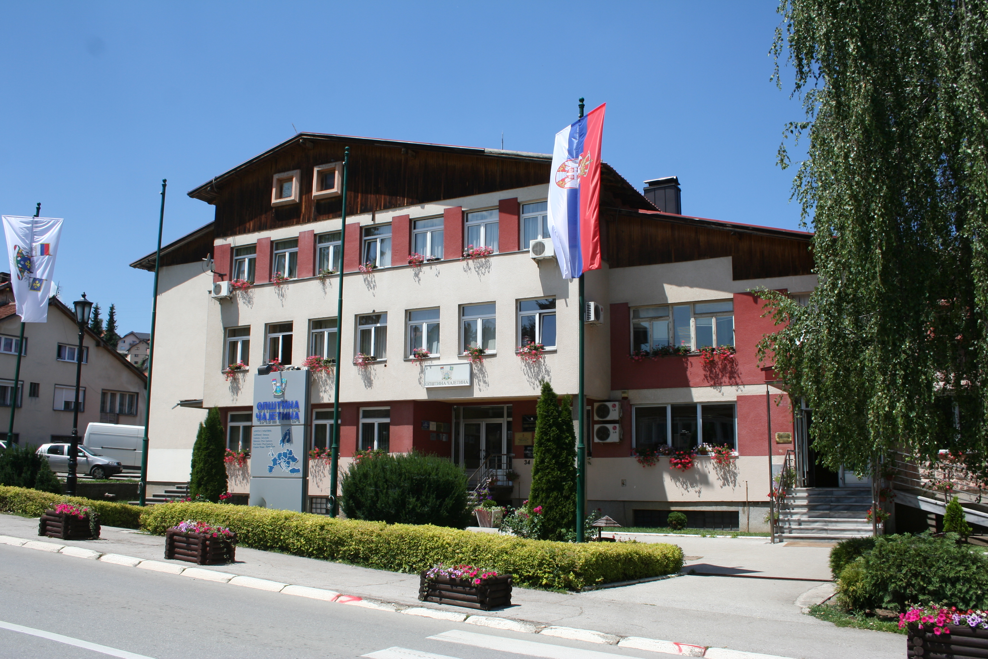 Čajetina